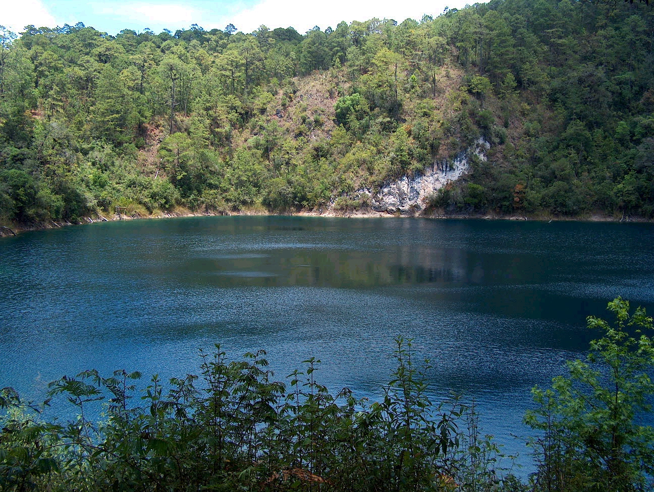 La Laguna Ensueño en el Parque Nacional Lagunas de Montebello.